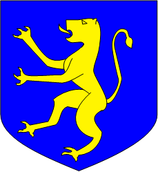 d’azur à une lionne d’or, qui est de la province de Lucca